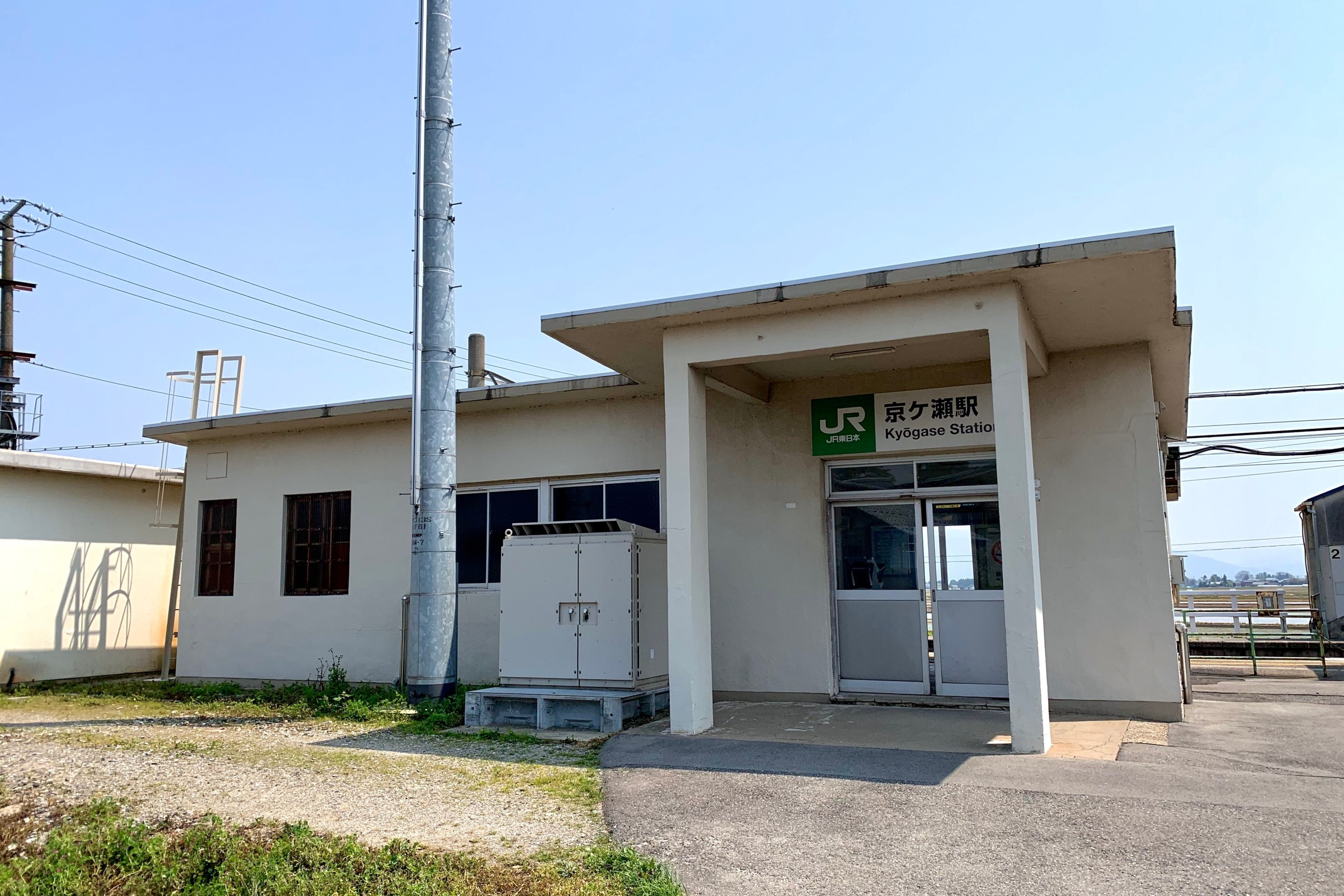 羽越本線京ケ瀬駅北口駅舎（2020年5月）